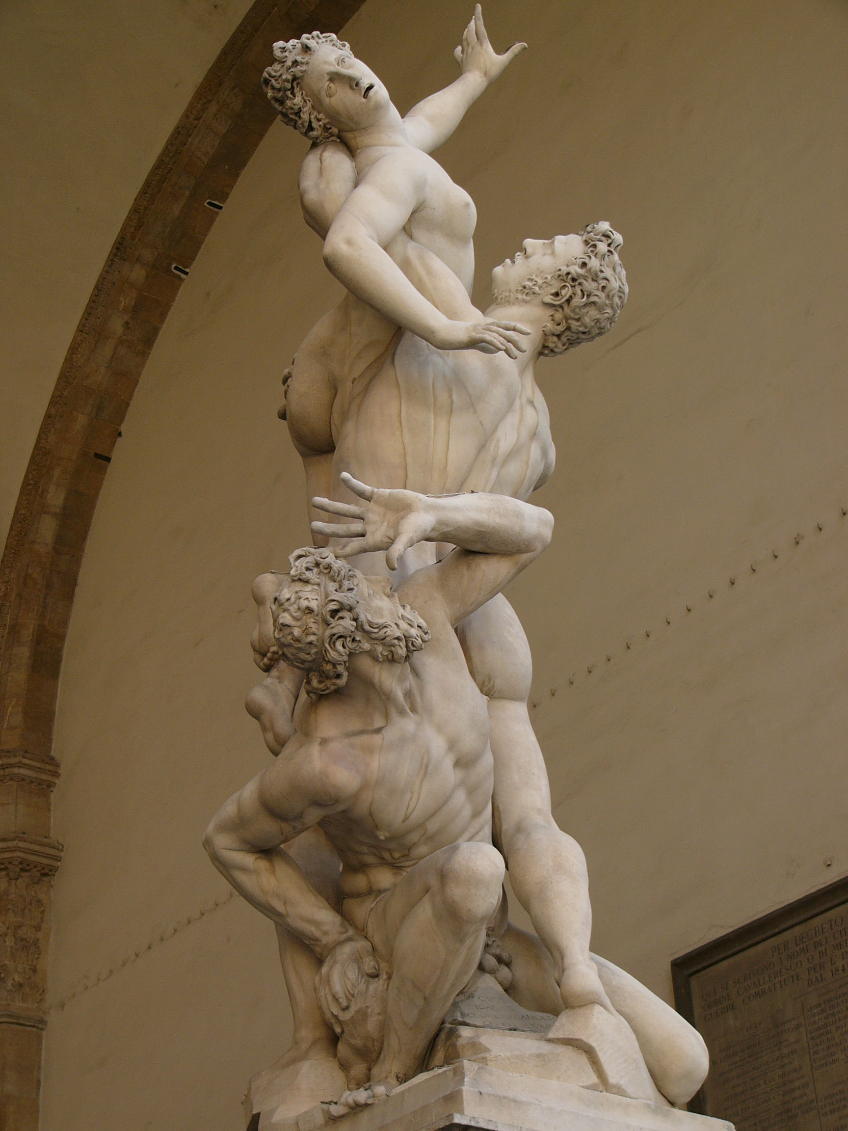 Beeld in Loggia dei Lanzi in Florence